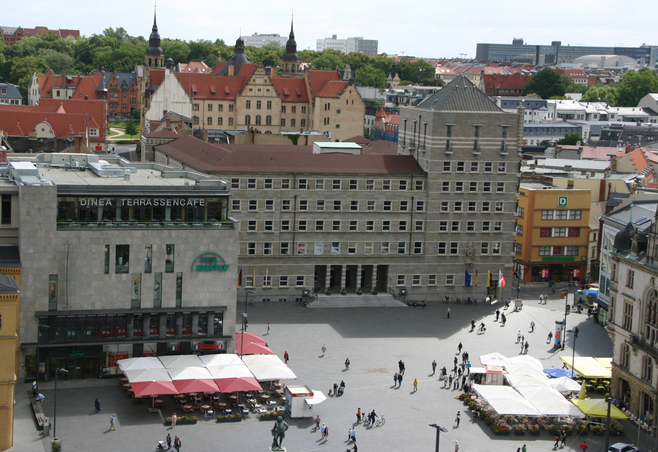 Halle (Saale), Blick von den Hausmannstürmen der Marktkirche Unser Lieben Frauen.